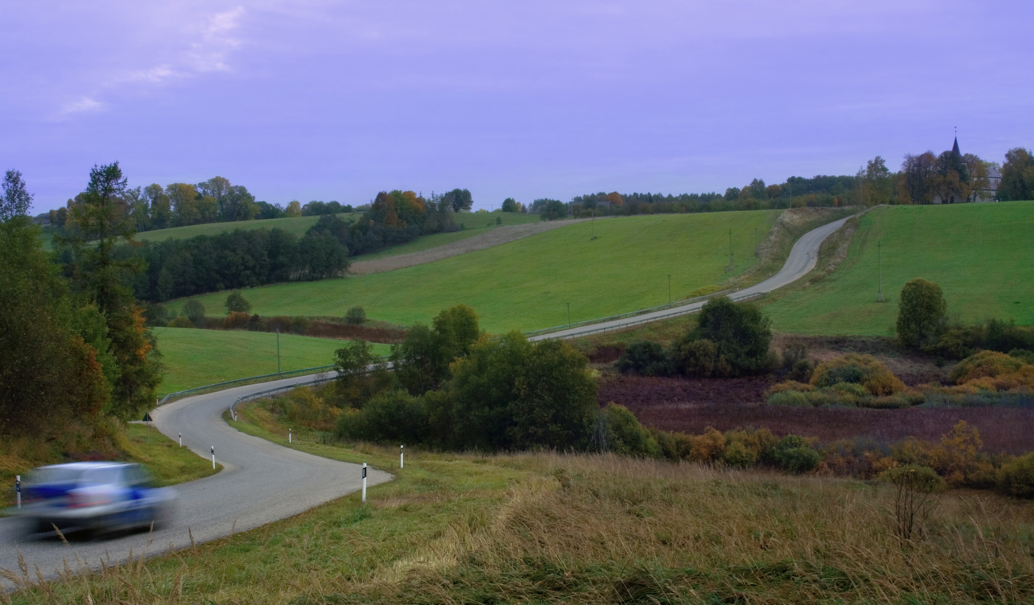 Urvaste ürgorg kirikuga